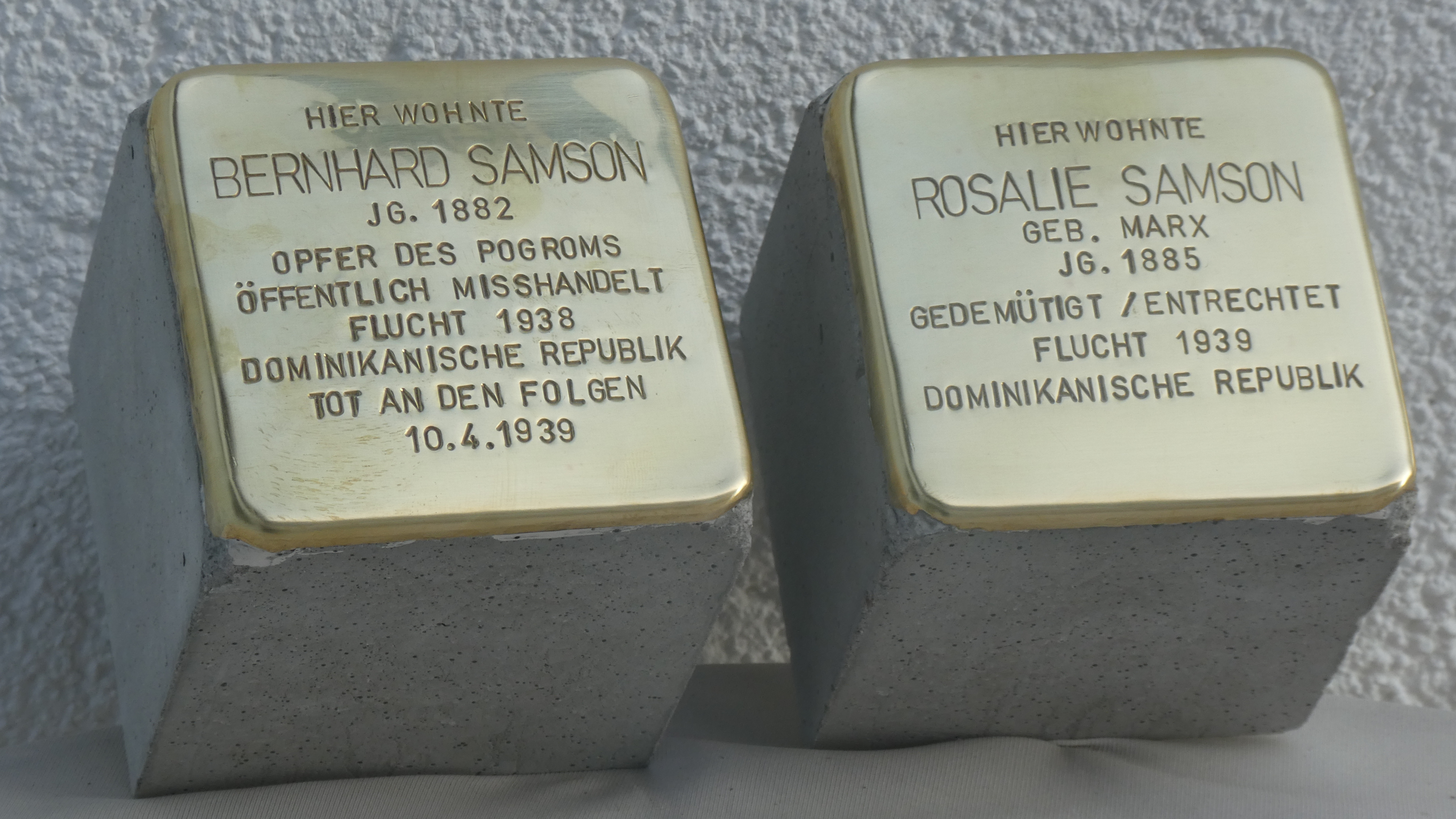 Lünen, NRW. Bei Bauarbeiten kam der 2009 verlegte Stolperstein für Bernhard Samson abhanden. Am 9.11.2017 wurde ein neuer Stein verlegt. Dabei wurde der Text aus 2009 leicht überarbeitet. Gleichfalls wurde 2017 für seine Frau ein Stolperstein verlegt.